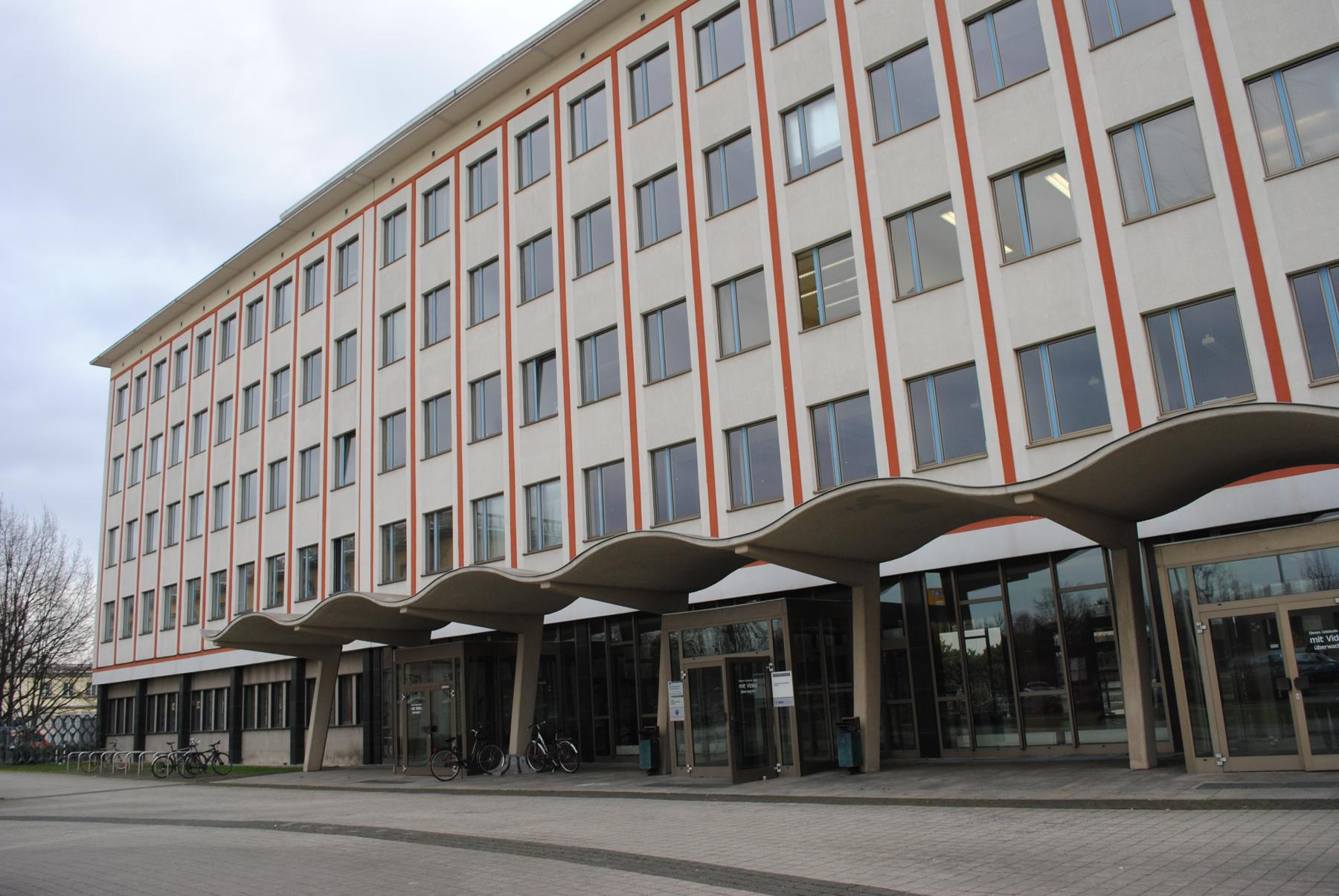 Paul Flechsig-Institut in Leipzig, Jahnallee 59, Im Jahr 2015 Umzug in Liebigstraße